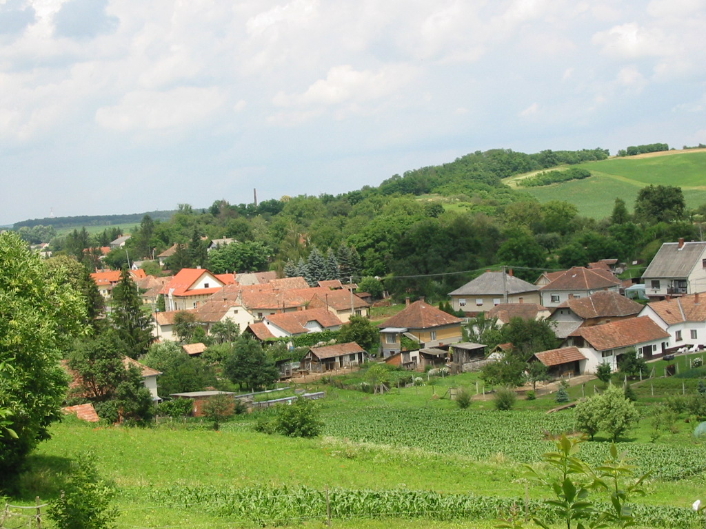 Gutorfölde látképe